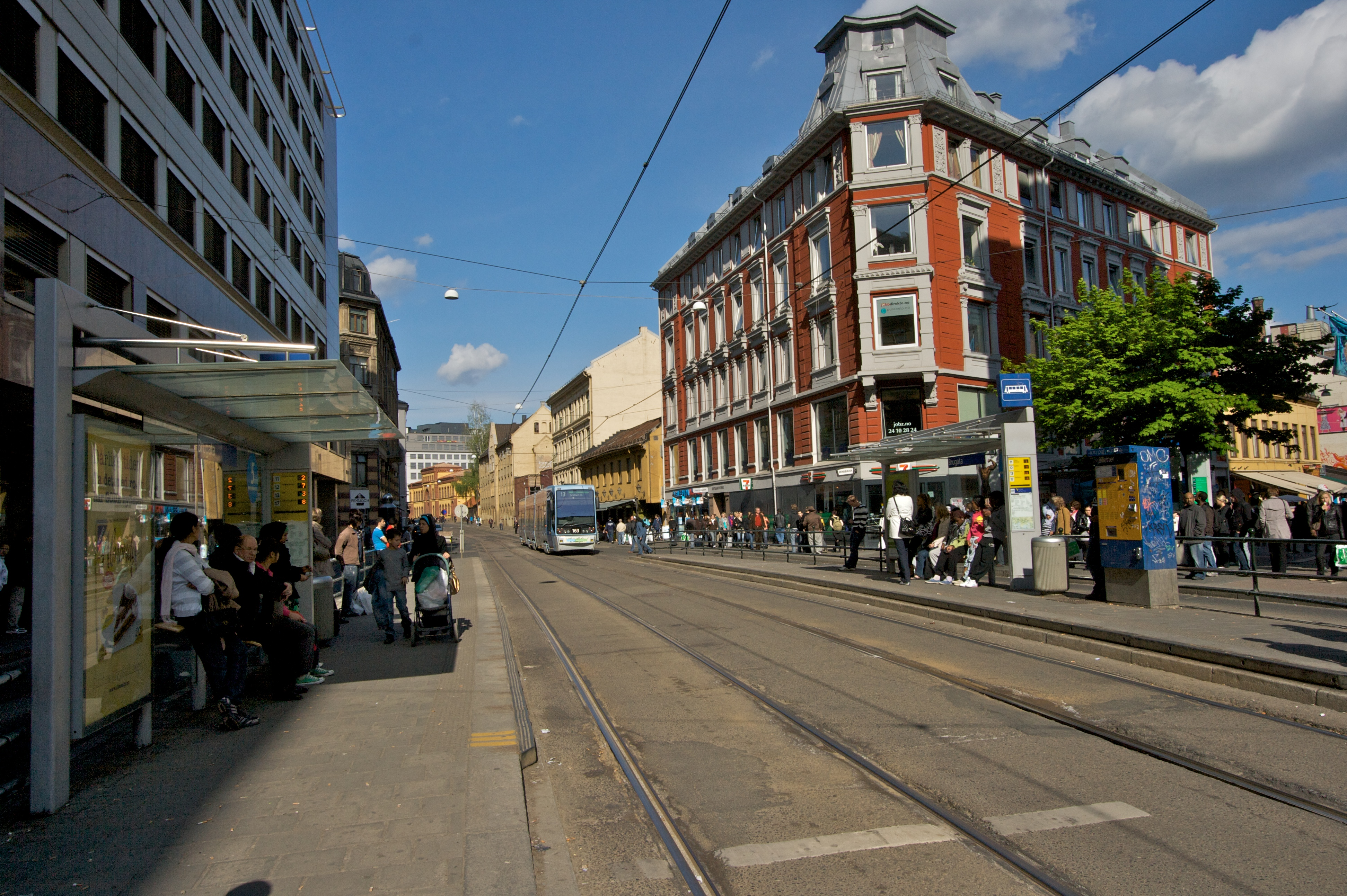 Trikkestoppet ved navn «Brugata», Storgata i Oslo.